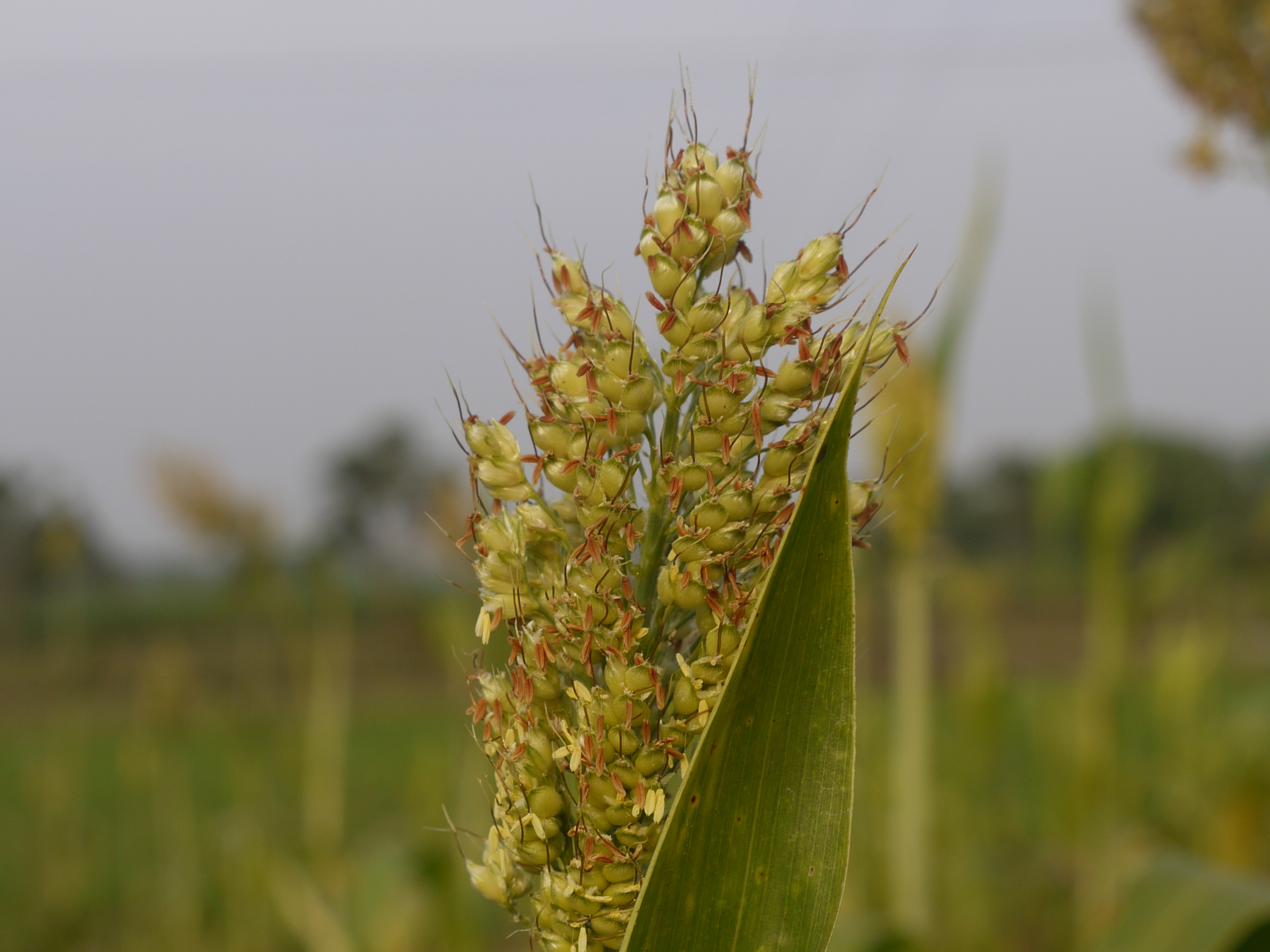 Sorghum bicolor